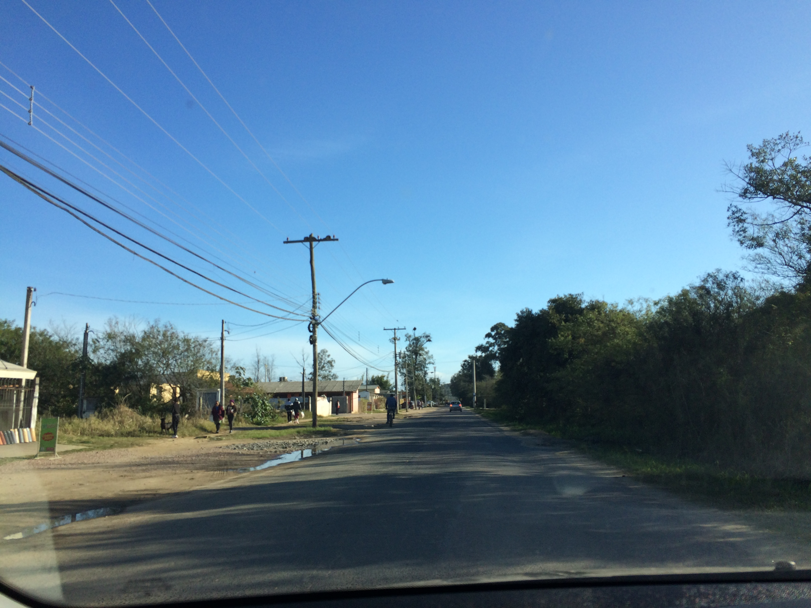 Avenida Principal da Ponta Grossa, no Bairro Ponta Grossa, em Porto Alegre, Brasil.